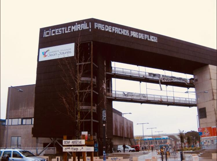 Tag sur l'Arche de l'université du Mirail pendant le blocus contre la loi ORE